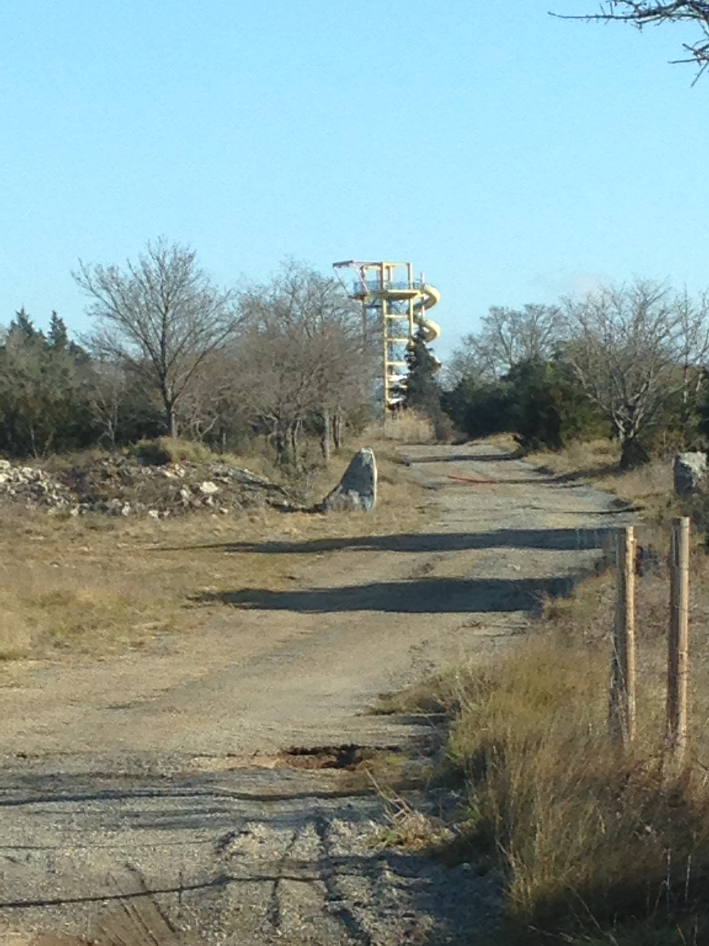 Vue du toboggan depuis la route Depicted place: Parc Avenue